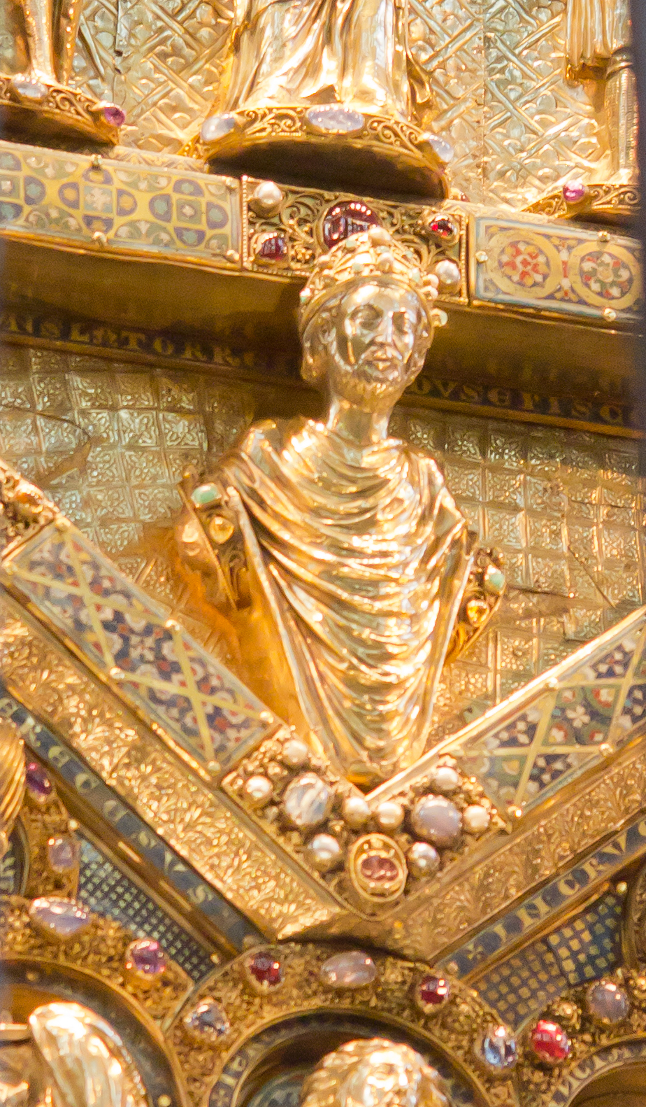 Dreikönigenschrein, Kölner Dom. Rückseite, Büste Rainald von Dassel